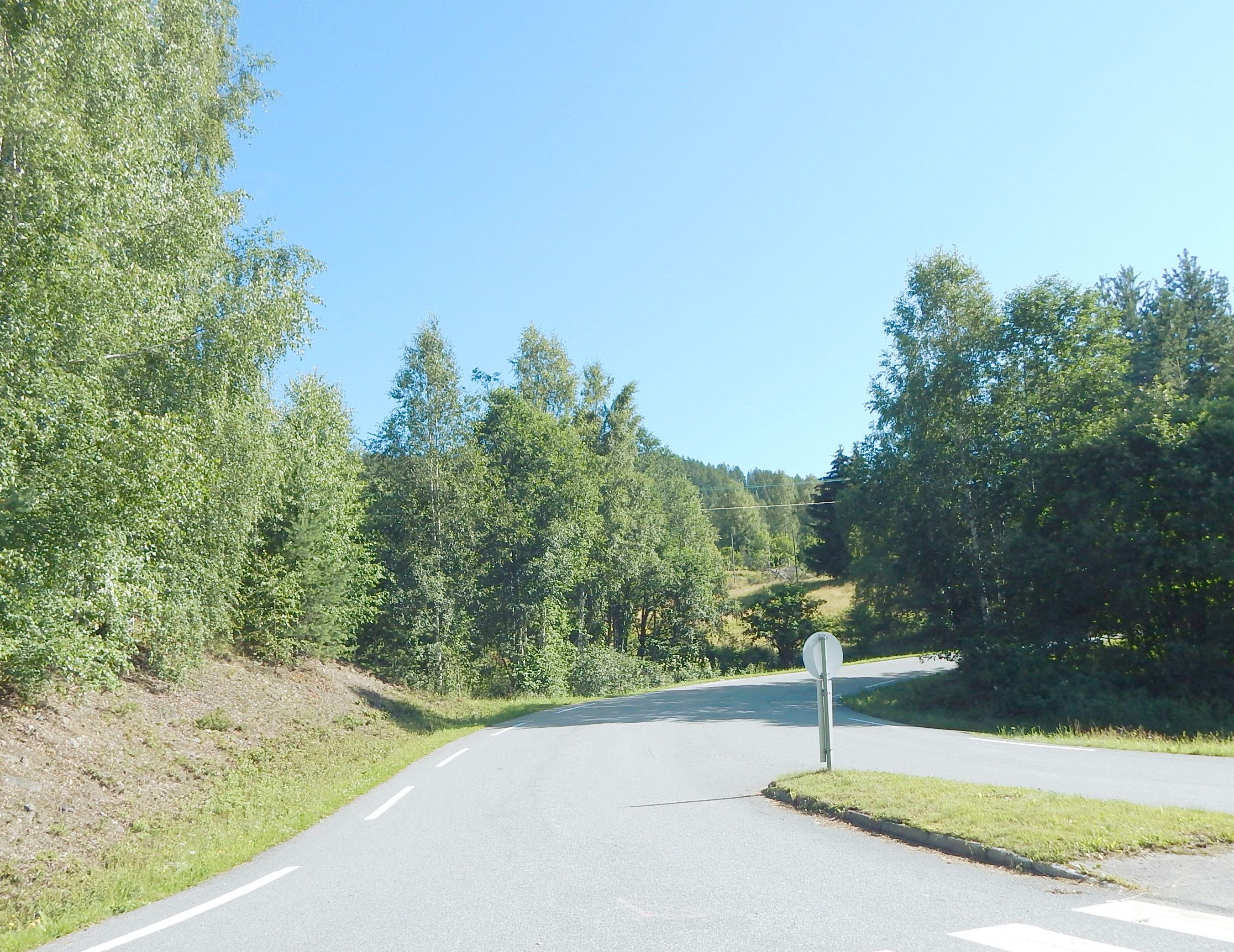 Ankaltrudslinna (fylkesvei 2430, tidl. 191) sett fra Nordsinni (primær fylkesvei 33)